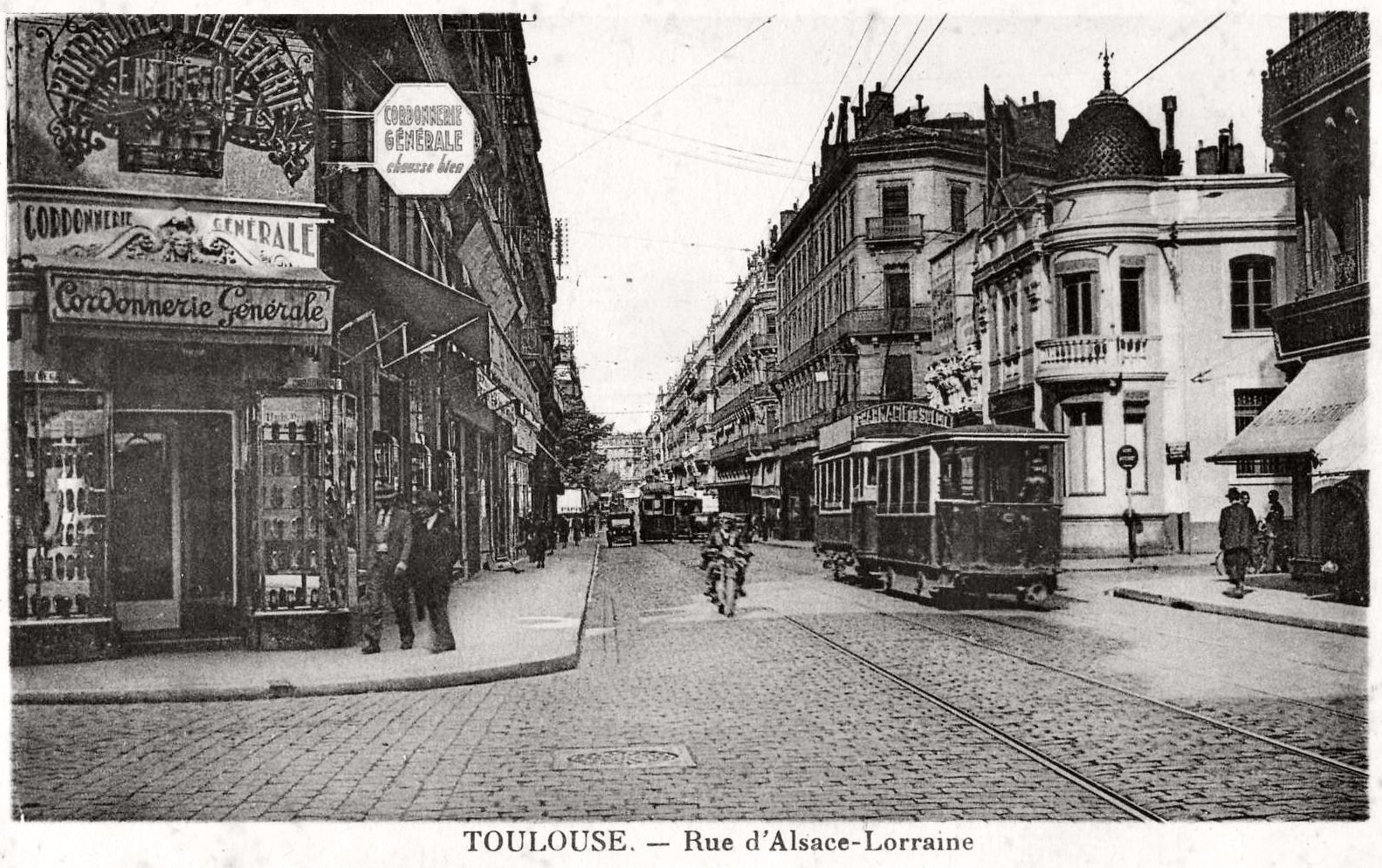 Carte postale ancienne, sans mention d'éditeur